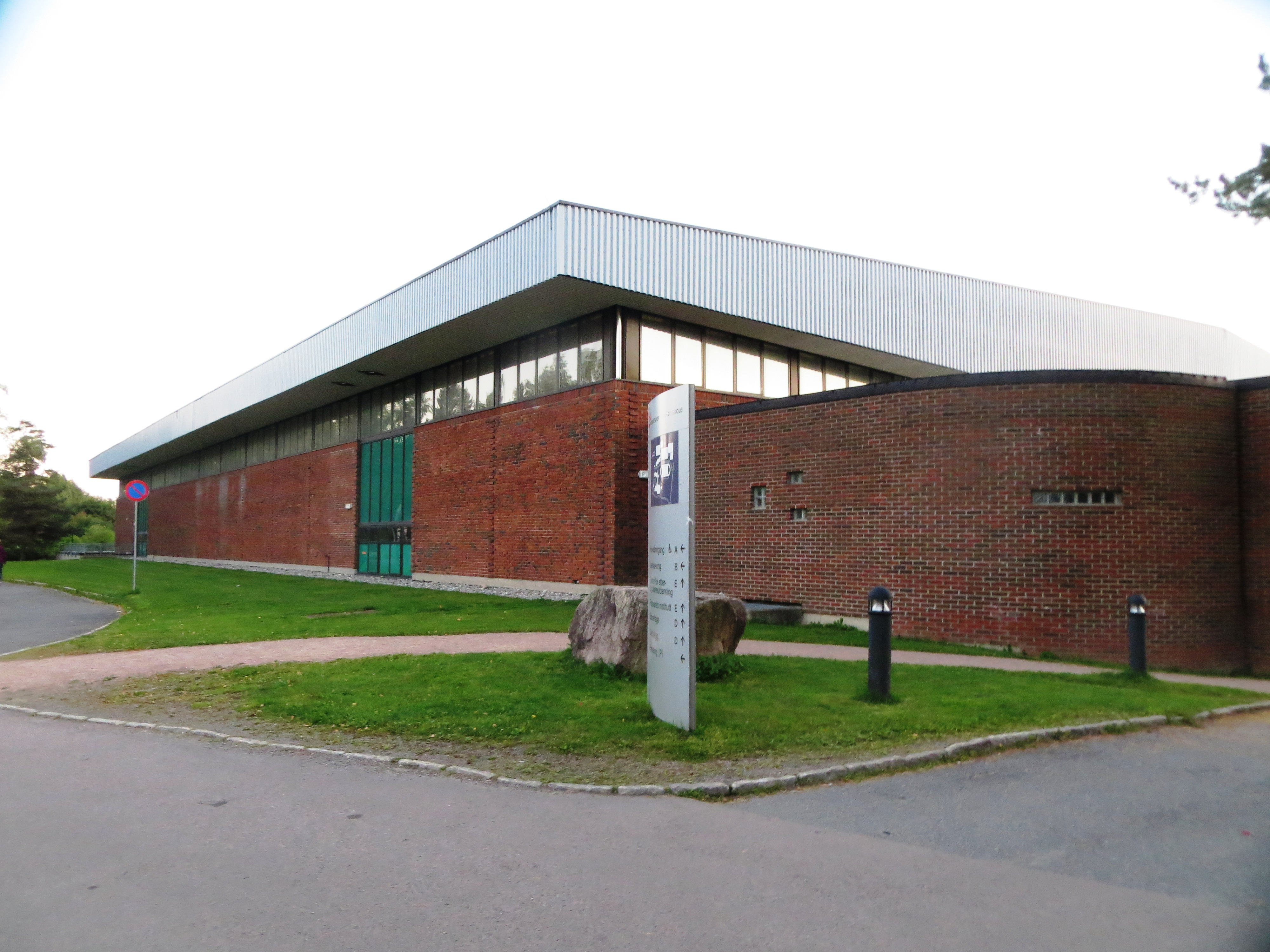 Norges Idrettshøyskole (NIH) på Sognsvann, Oslo. Bygningene er funksjonalistiske.